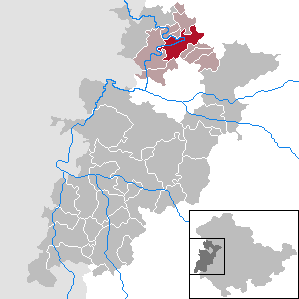 Mihla in Thuringia - Wartburgkreis